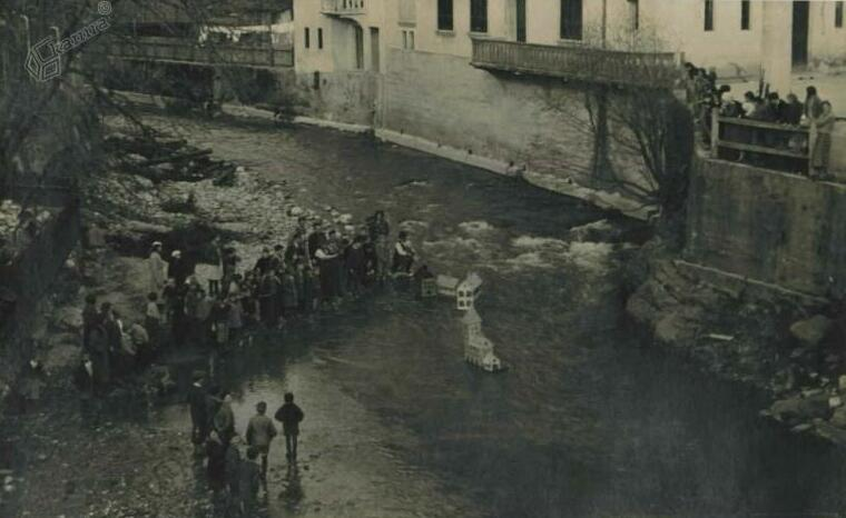 Razglednica Tržiča.